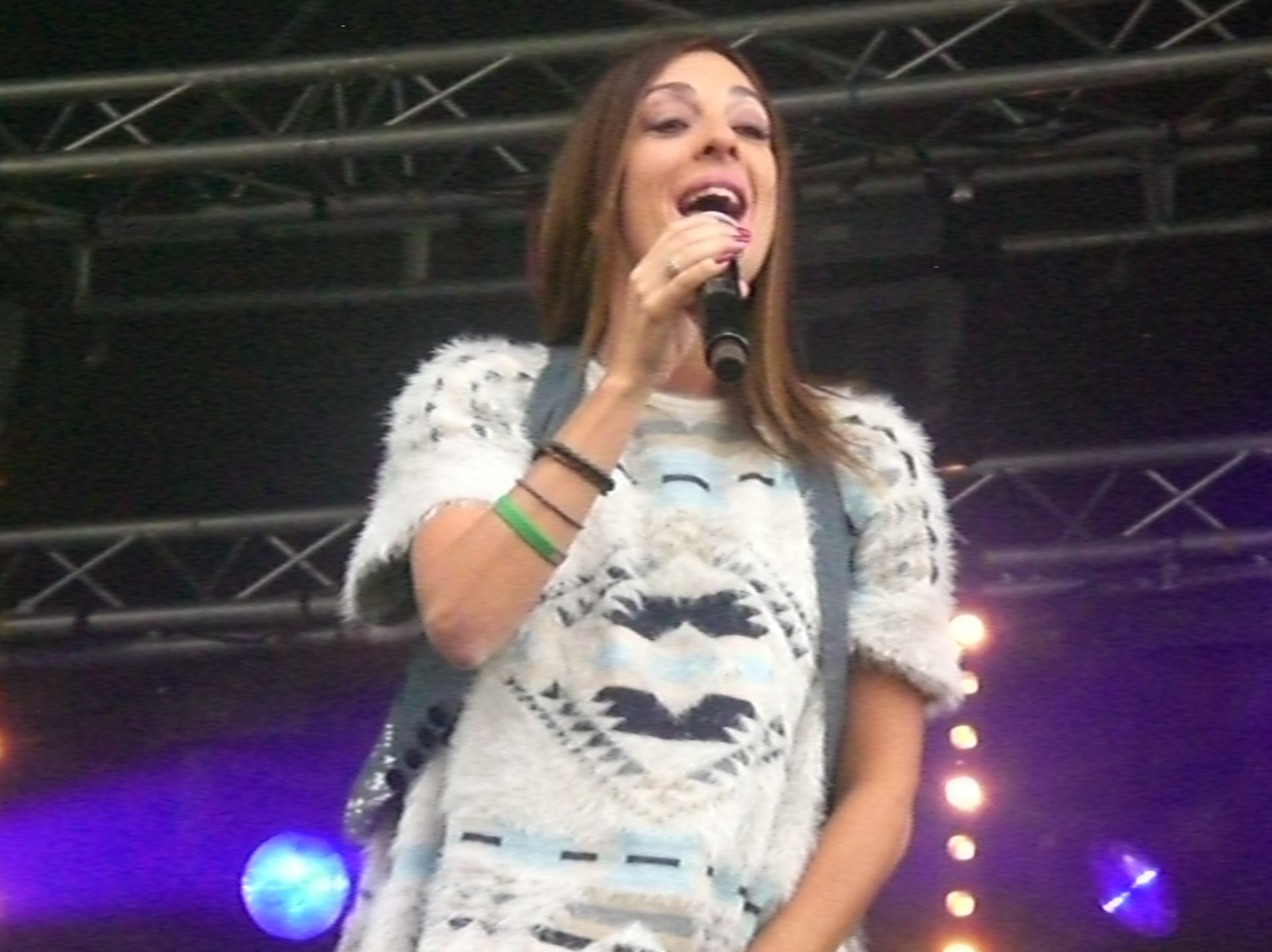 Ève Angeli lors d'un concert à Montigny-en-Gohelle (Pas-de-Calais), le 6 septembre 2015.